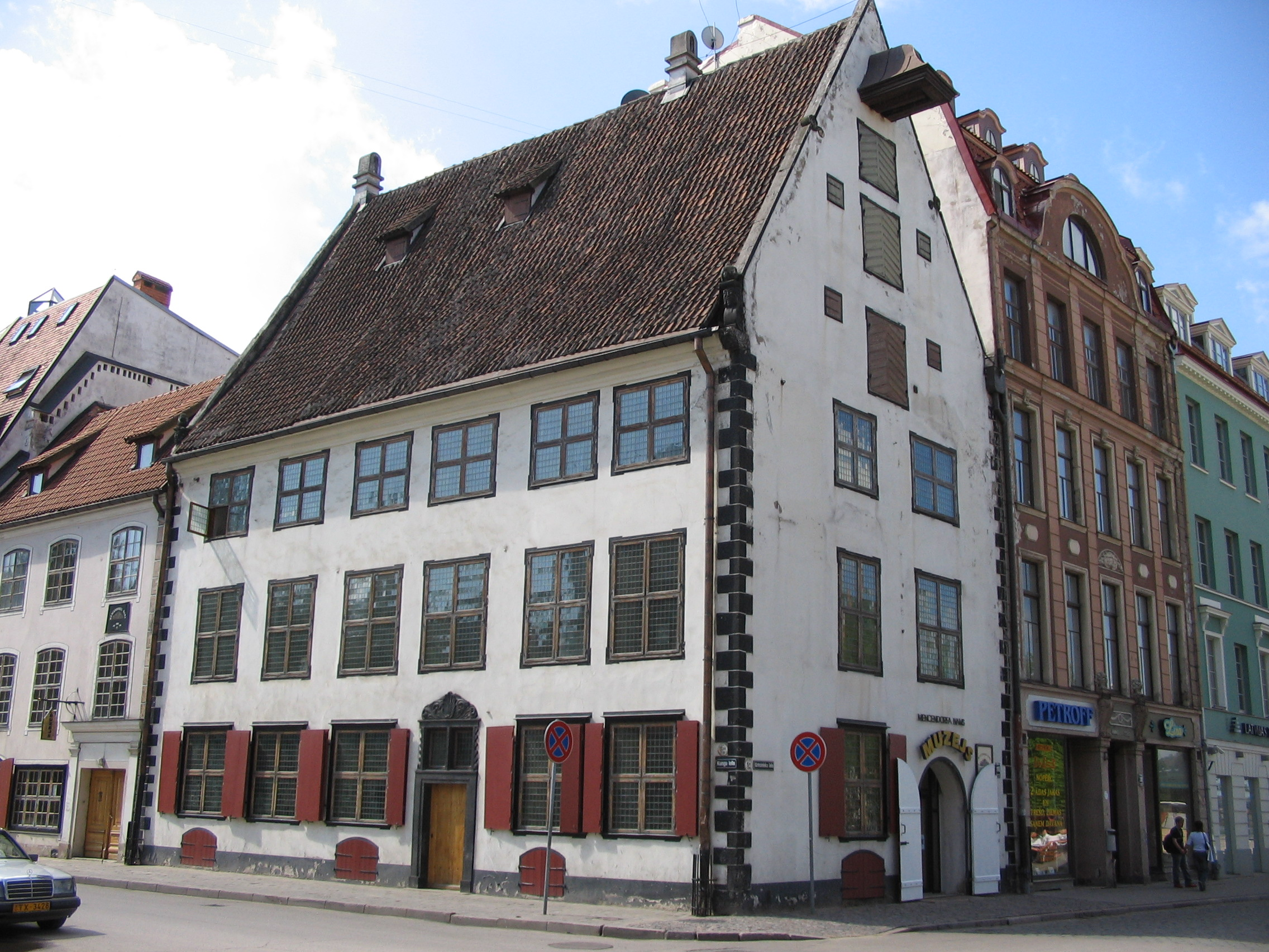 eigen foto - Riga Mentzendorffhouse in het oude centrum